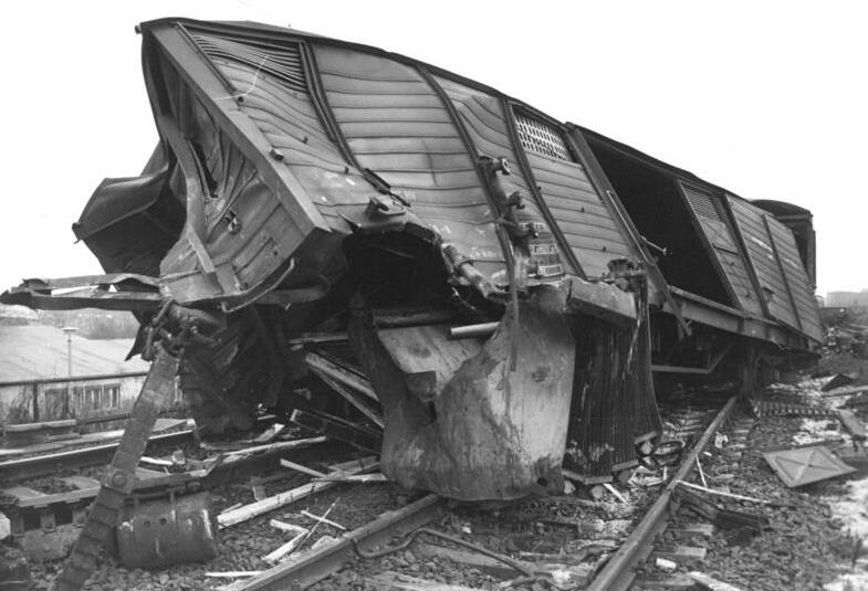 17.12.1990-fd Berlin: Unglück-Wegen einer Zugkollision am frühen Montagmorgen auf der Fernbahn Ostkreuz-Treptower Park blieb der S-Bahnverkehr im Berliner Osten auf einigen Strecken bis zum frühen Nachmittag beeinträchtigt. Zwei gekoppelte Loks waren um 1.27 Uhr auf einen haltenden Güterzug aufgefahren. Die vordere Lok hatte sich mit rund 40 km-h unter den letzten Hänger des Güterzuges geschoben und diesen bis an die Fahrleitung geschoben. Die Lok entgleiste. Der entstandene Schaden wird von der Reichsbahndirektion auf 150.000 DM geschätzt. Nach Auskunft der Reichsbahn liegt menschliches Versagen des Lokführers vor, der "gültige Signalanlagen nicht beachtet" habe. ADN-Bernd Settnik"